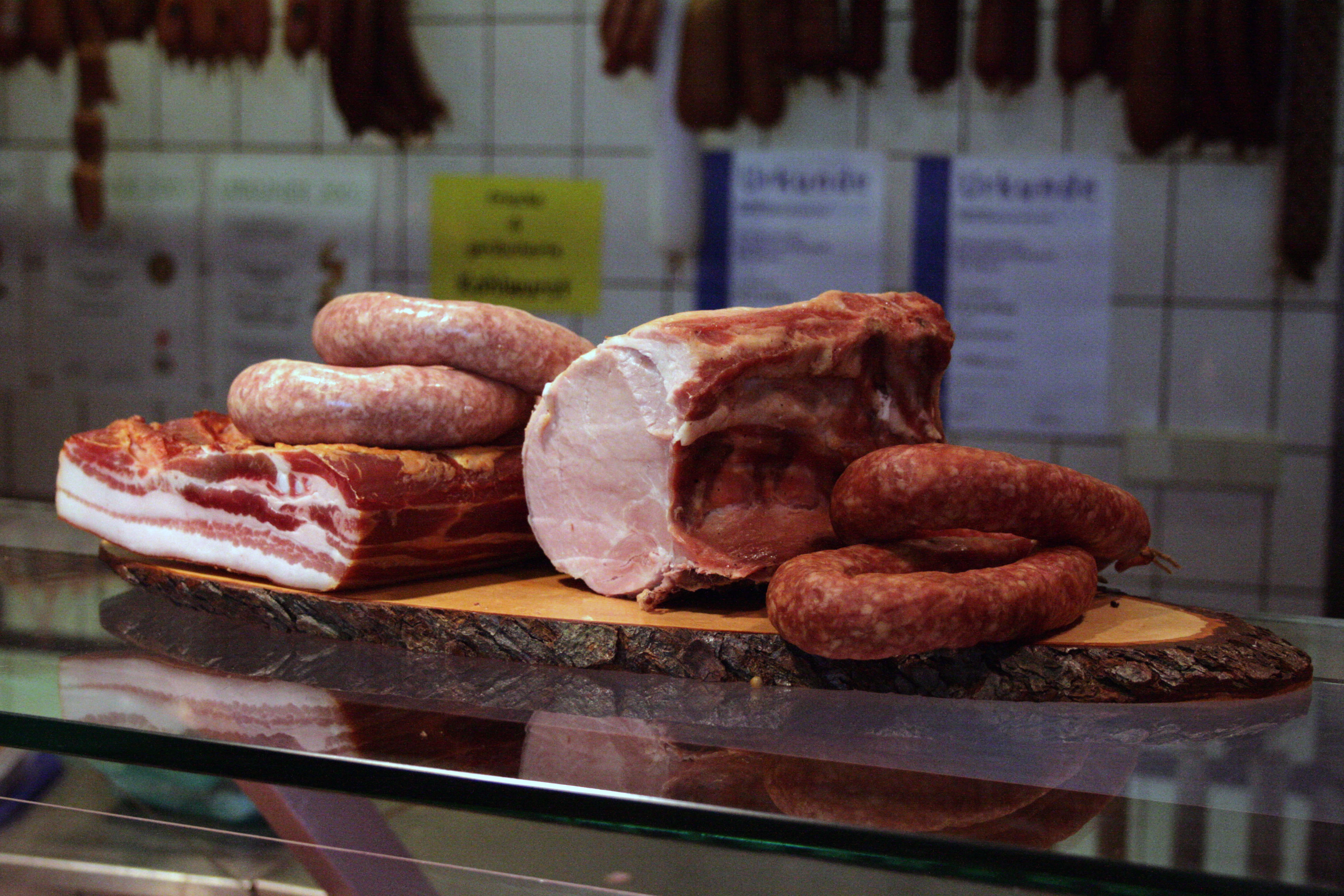 Zutaten für Grünkohl (Speck, Kohlwurst, Kasseler, geräucherte Kohlwurst) in der Metzgerei (Metzgerei Klaus, Versmold)